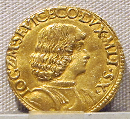 Palazzo Massimo alle Terme